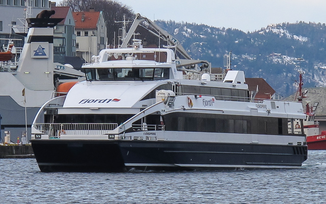 MS Fjordprins in Bergen